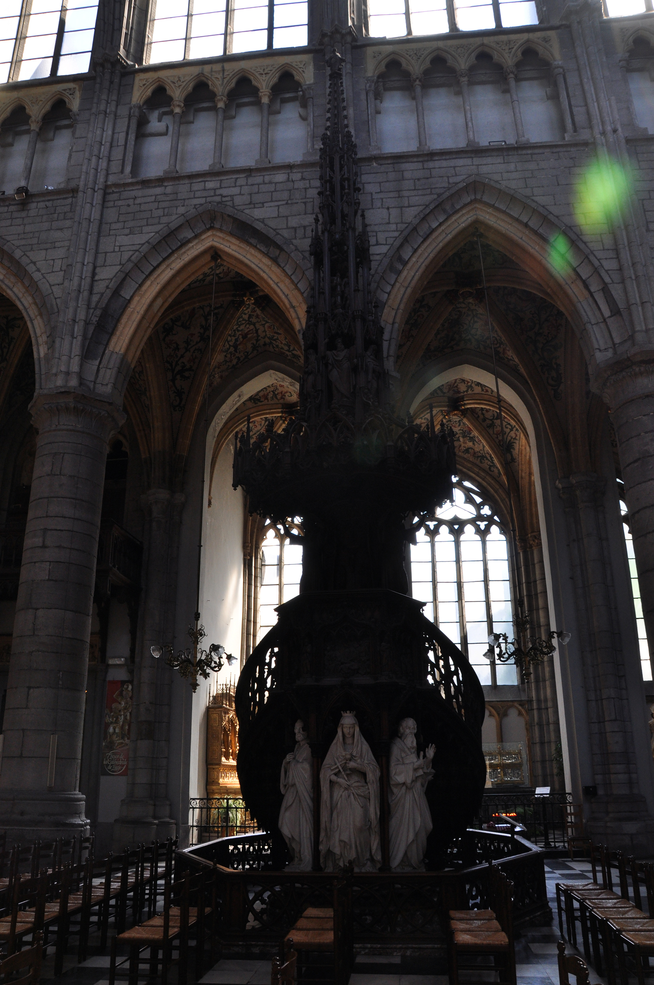 Cathédrale Saint-Paul de Liège; la chaire, par Guillaume Geefs (1805-1883), de style néo-gothique, datant du milieu du 19ème siècle.